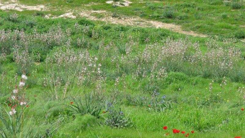 Pura Nature Reserve in the north Negev.